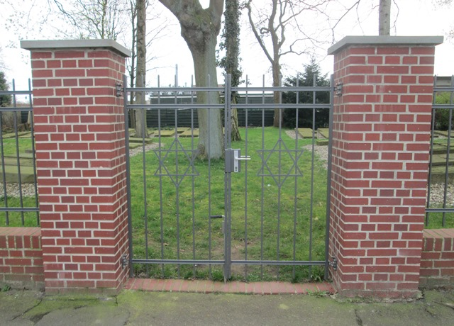 Eingangstor zum Jüdischen Friedhof in Glückstadt / Holstein